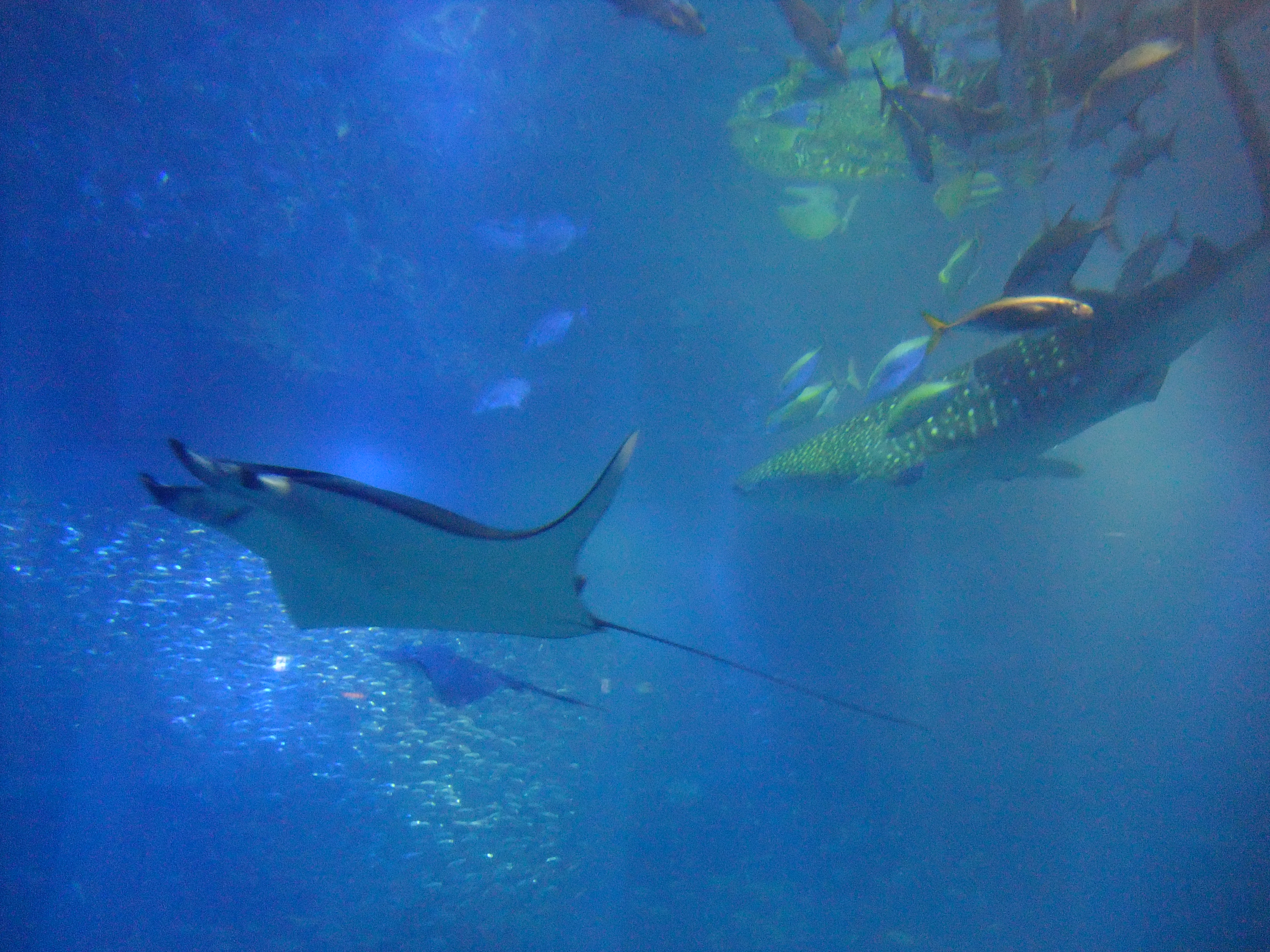 海遊館のジンベエザメとマンタ